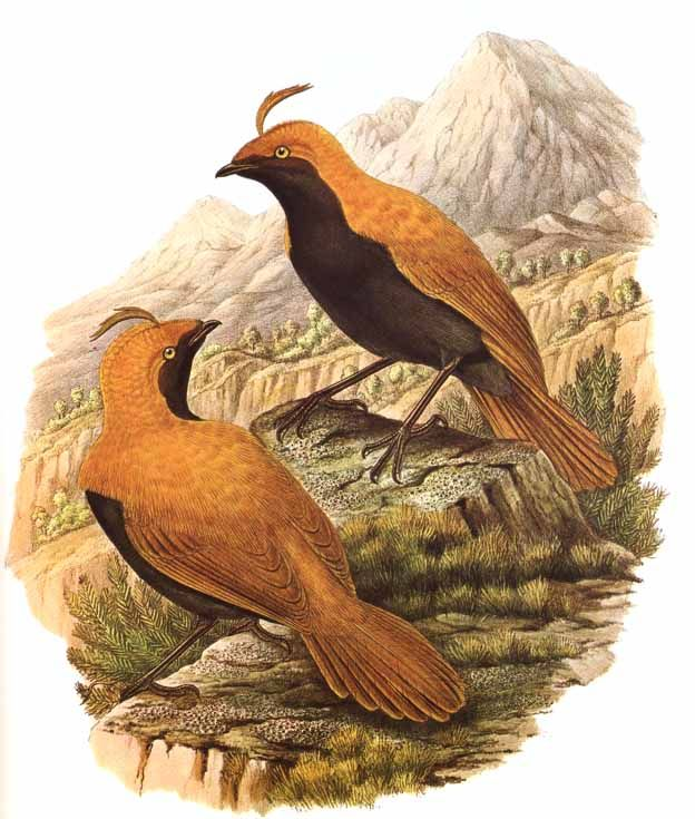 Cnemophilus macgregorii